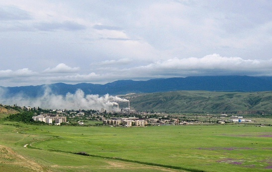 კასპი